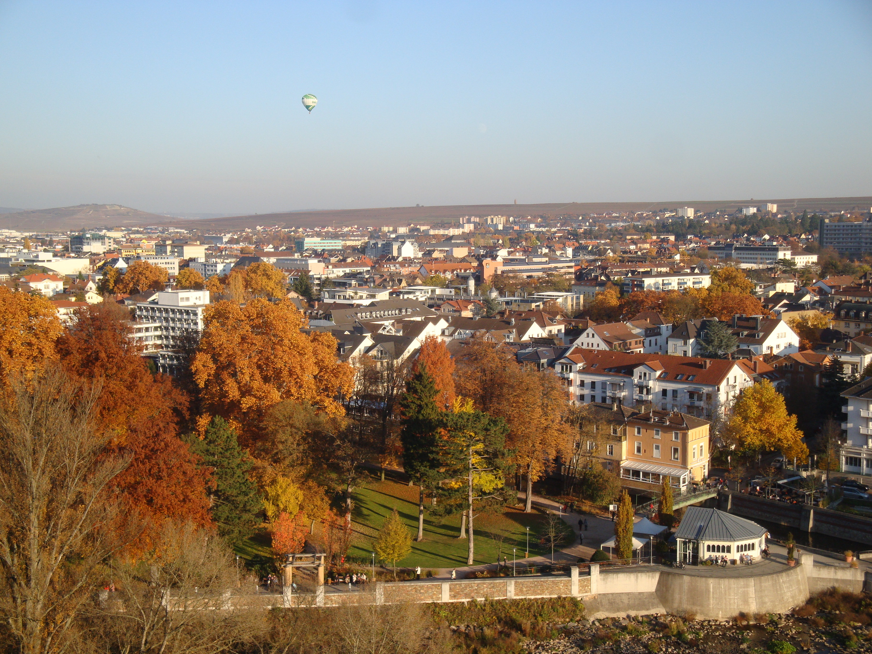 Denkmalzone Kurpark Bad Kreuznach: Links im Bild ein Teil des Kurparks, rechts im Bild ist die Elisabethenquelle zu sehen